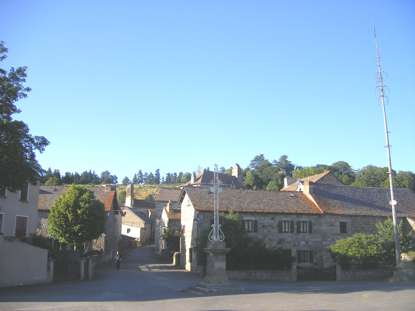 Pelouse, Lozère, France.